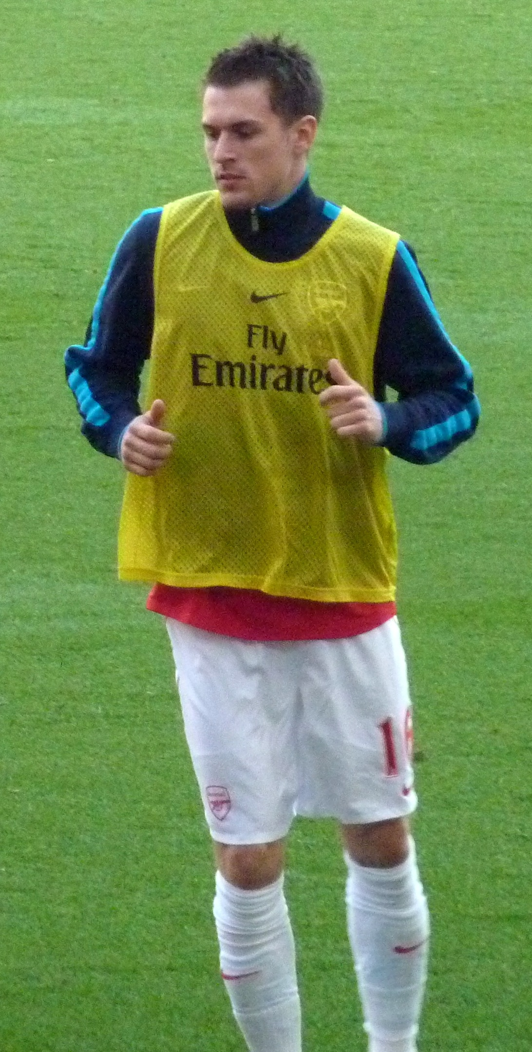 Аарон Рэмзи